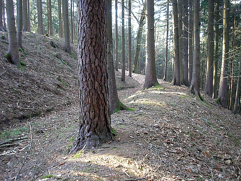 Burgstall Appertshausen (Petersdorf, Landkreis Aichach-Friedberg, Bayerisch-Schwaben). Der Nordostteil der Hauptburg. Eigene Aufnahme, Jan. 2008 / Former Appertshausen castle near Petersdorf (Landkreis Aichach-Friedberg, Bavaria, Germany). The north eastern part of the central castle. Own photo, Jan. 2008